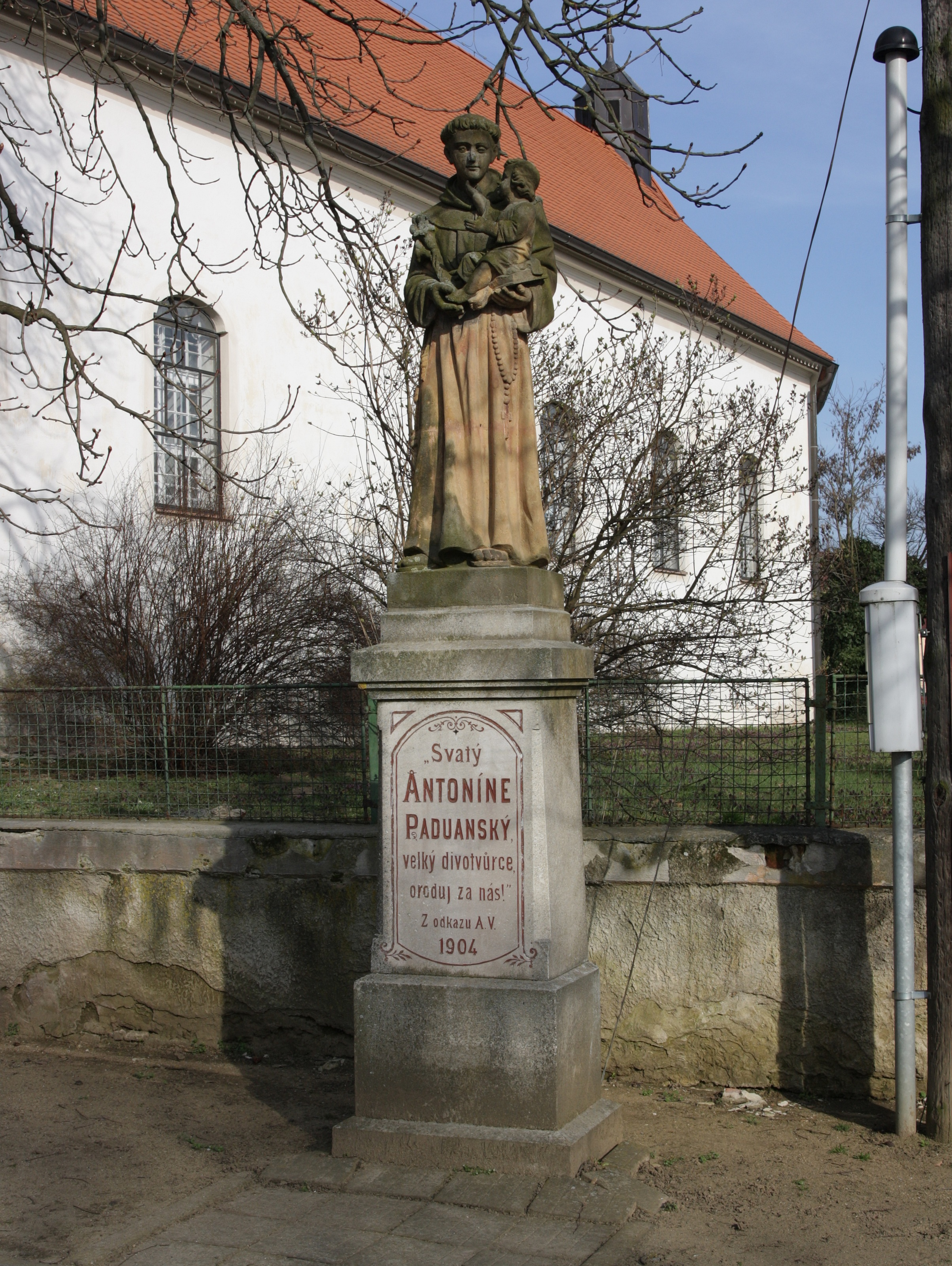 Horní Kounice - socha sv. Antonína Paduánského u kostela.